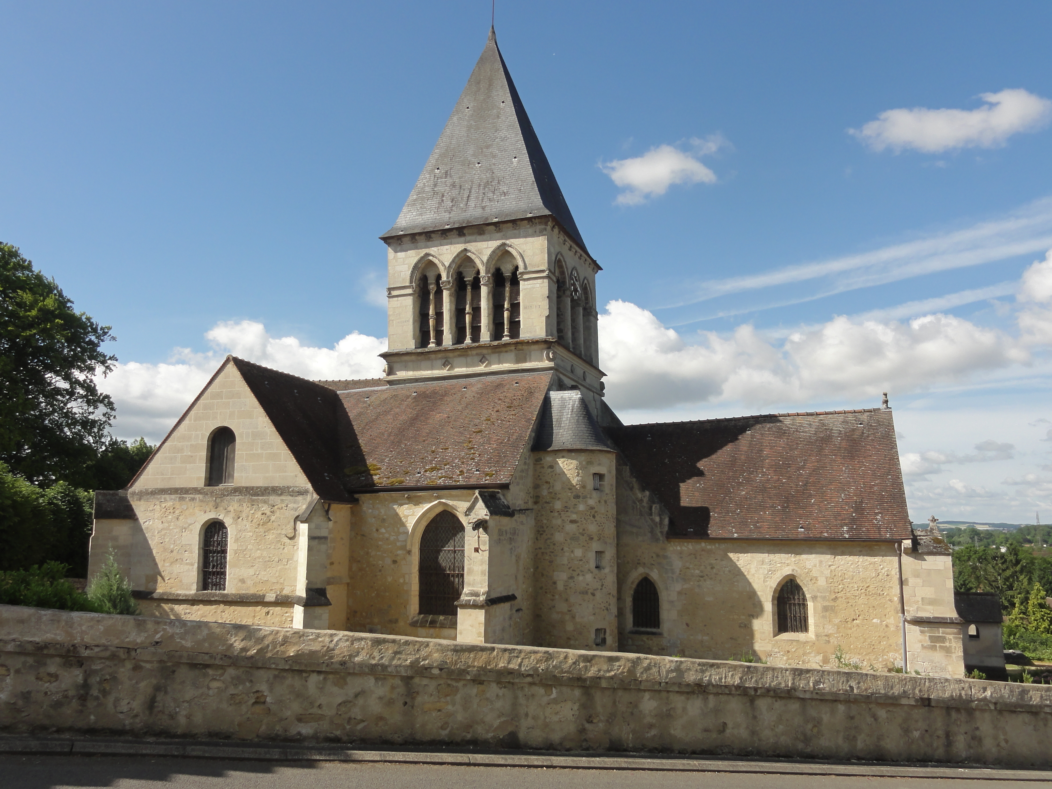 Église Saint-Étienne de Clairoix (voir titre).